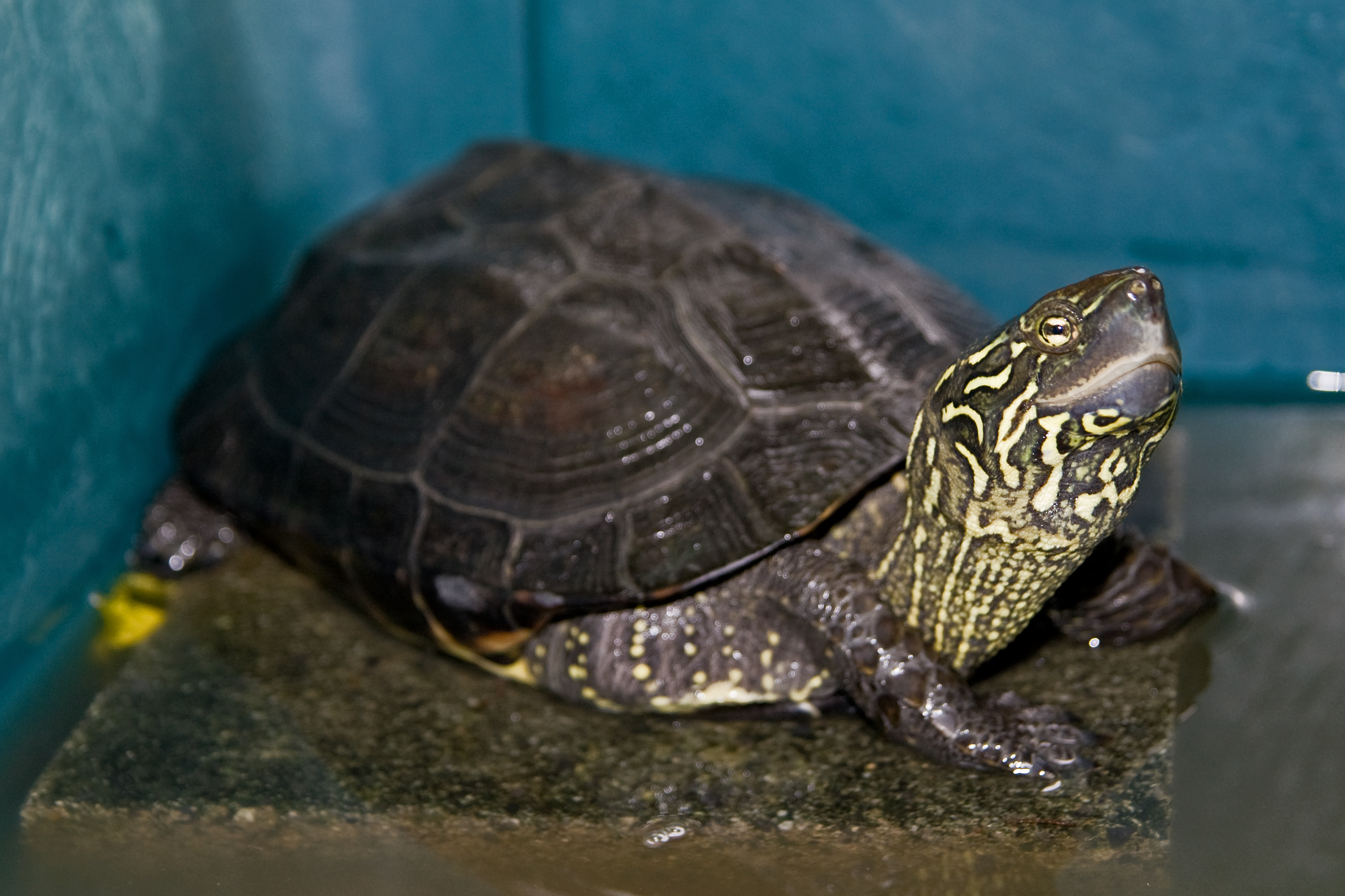 クサガメ (学名:Chinemys reevesii)